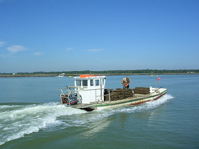 Marennes